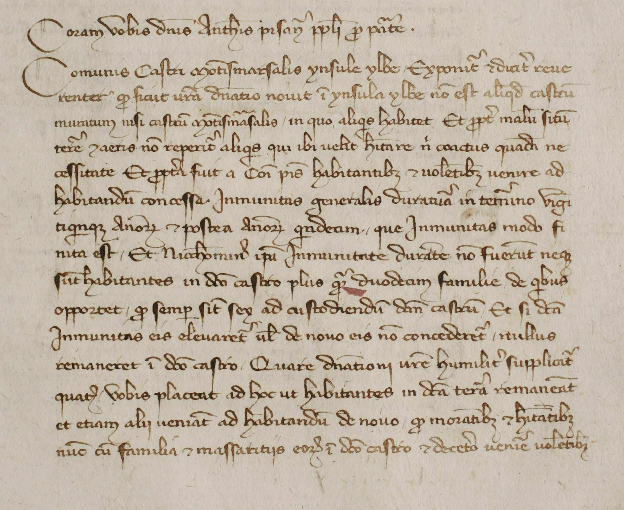 Supplica del 1345 in cui gli abitanti del villaggio di Montemarciale (isola d'Elba) chiedono sgravi fiscali al governo di Pisa. Nel documento si afferma che il villaggio era ammorbato da aria malsana e le sue famiglie erano soltanto 12, delle quali 6 costantemente impegnate alla custodia e alla manutenzione dell'abitato stesso.